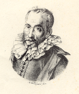 Portret van Jacob Duym (1547-1612/1614)